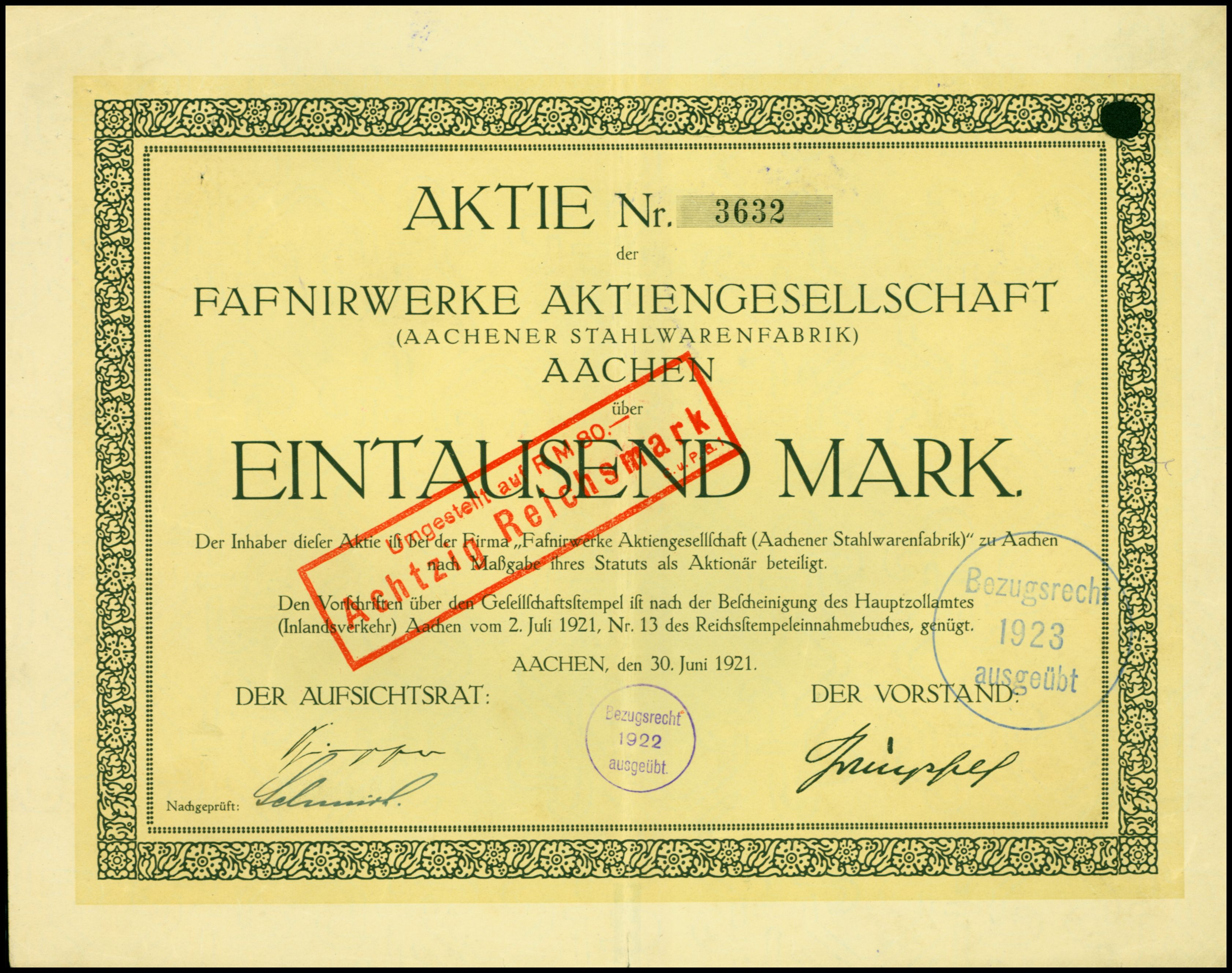 Aktie über 1000 Mark der Fafnirwerke AG vom 30. Juni 1921